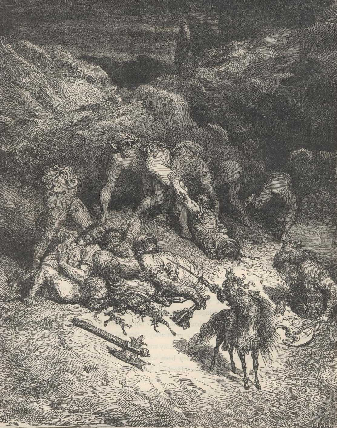 Gustave Doré, ilustração para "Dom Quixote" de Miguel de Cervantes